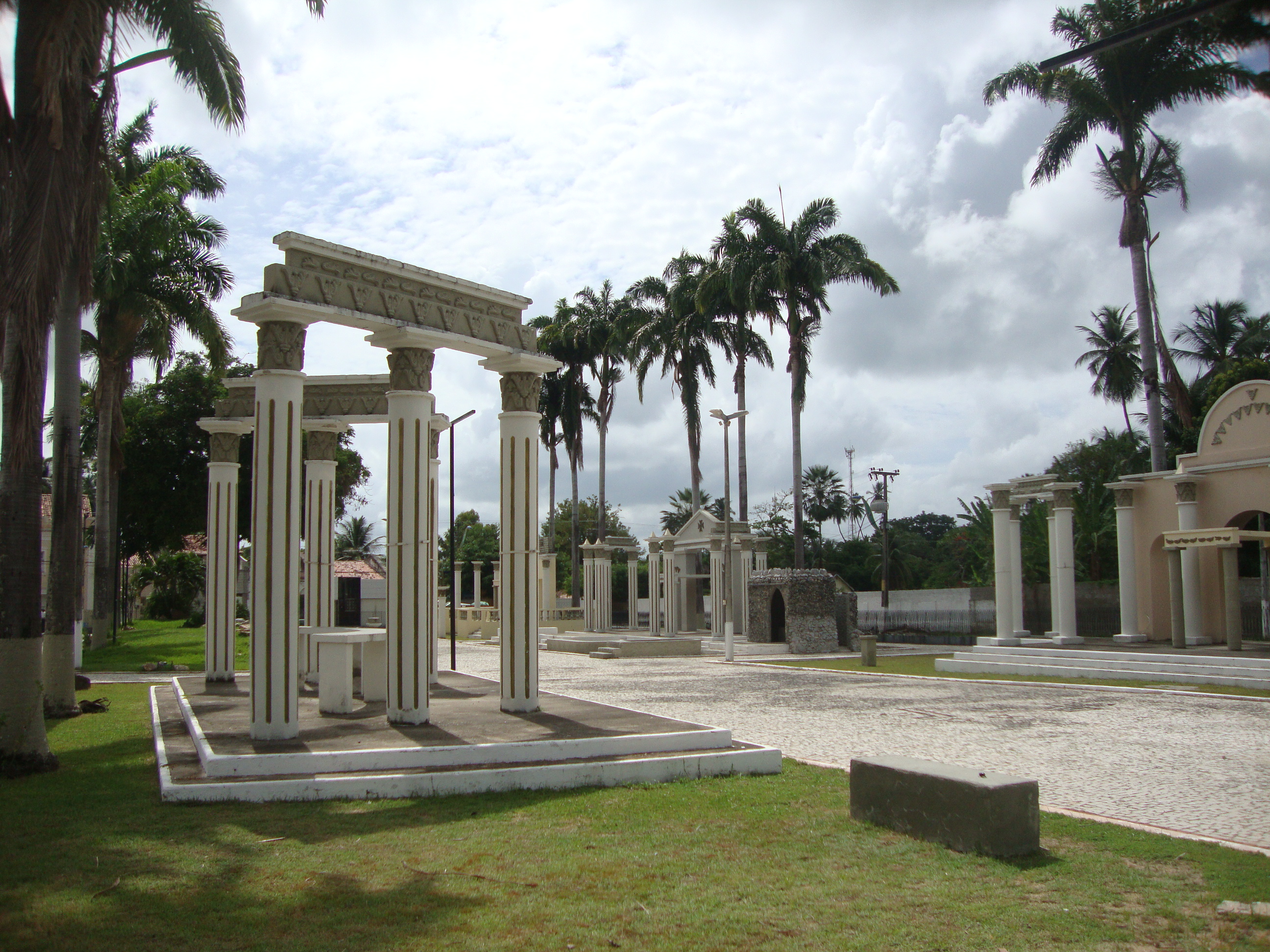 Praça da Paixão, onde é encenada a Paixão de Cristo em Pacatuba - CE, Brasil.